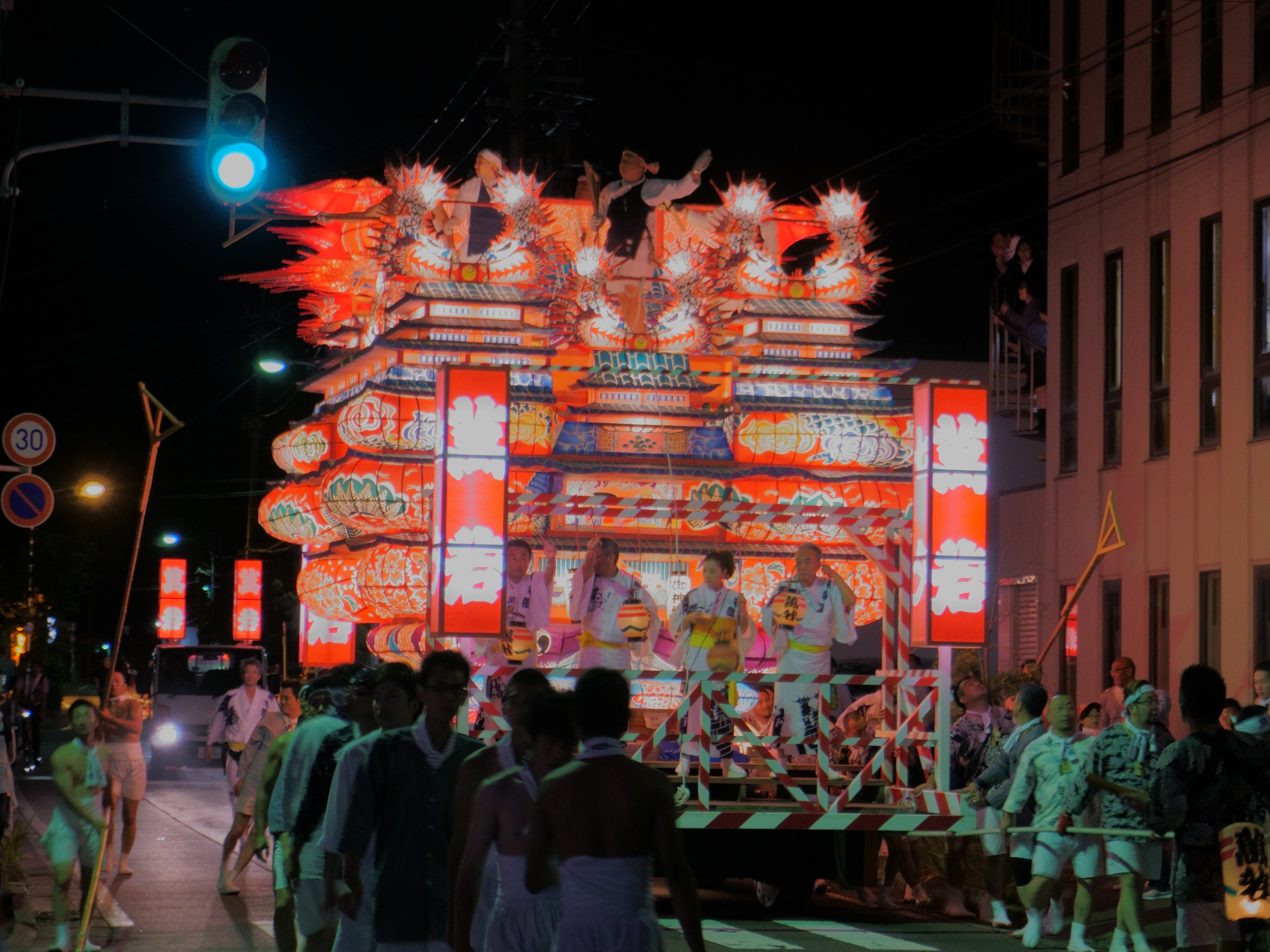 秋田県能代市の中心街で行われる伝統行事「能代役七夕」。2017年の運行は萬町組（あらまちぐみ）の担当で、萬若の燈籠と加勢丁の燈籠の2基が市内を練り歩いた。役七夕の燈籠は電線の下をくぐる際路面電車のビューゲルのように鯱を倒す仕掛けが施されている。北羽新報本社前にて